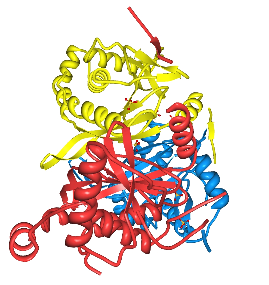 Estructura tridimensional del sitio activo del trímero de la enzima dihidrolipoamida succinil transferasa creada con el Protein Workshop.